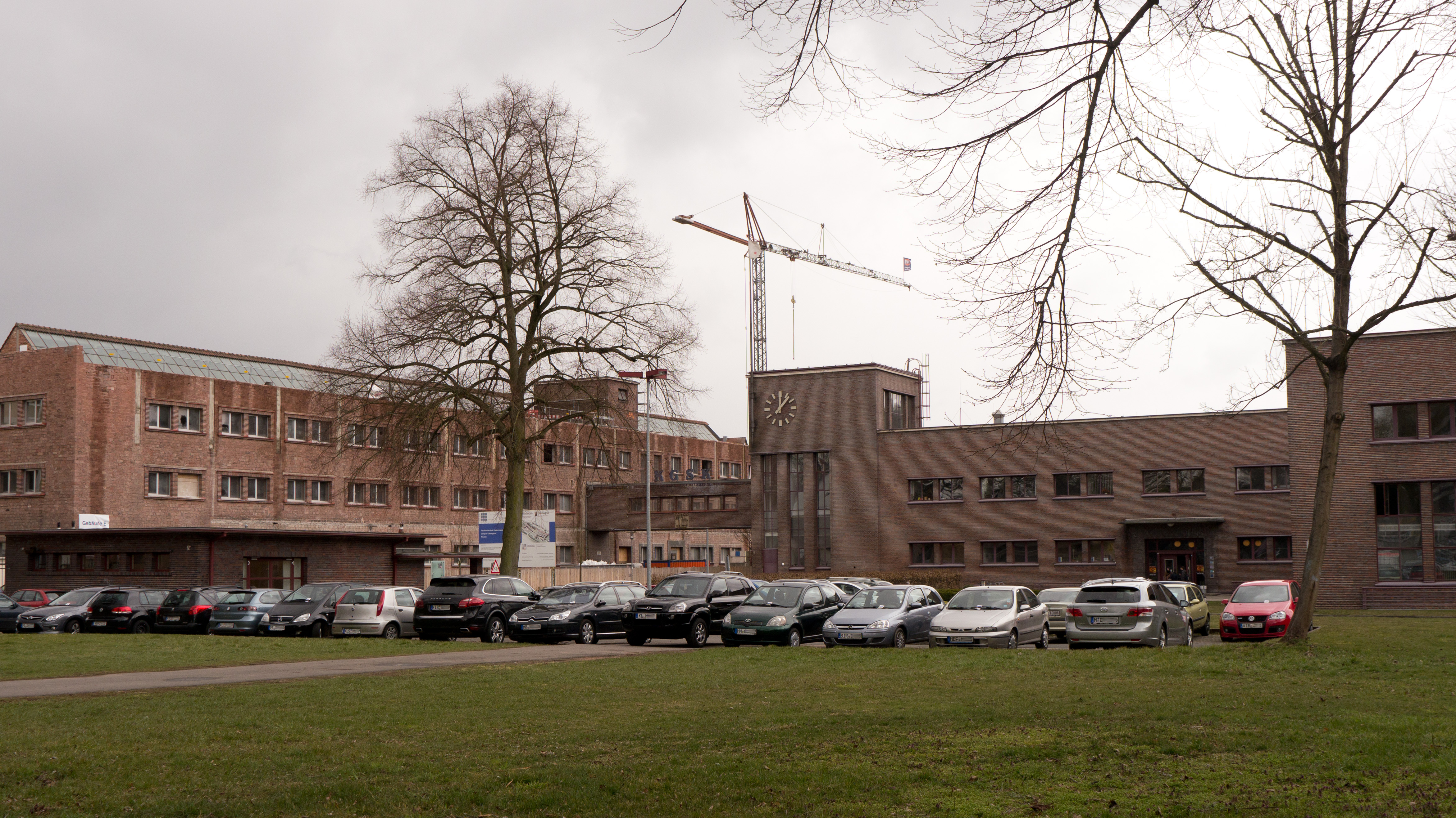 Außenansicht der Kammgarnspinnerei in Kaiserslautern